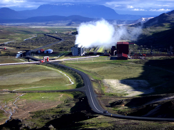 Kröflustöð, central geotérmica junto al volcán Krafla, Islandia